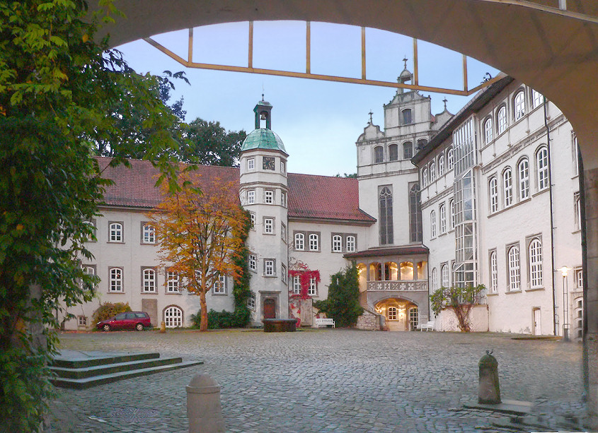 Schloss Gifhorn Gifhorn Castle, Germany. Foto aufgenommen von Benutzer User:AxelHH, Oktober 2006